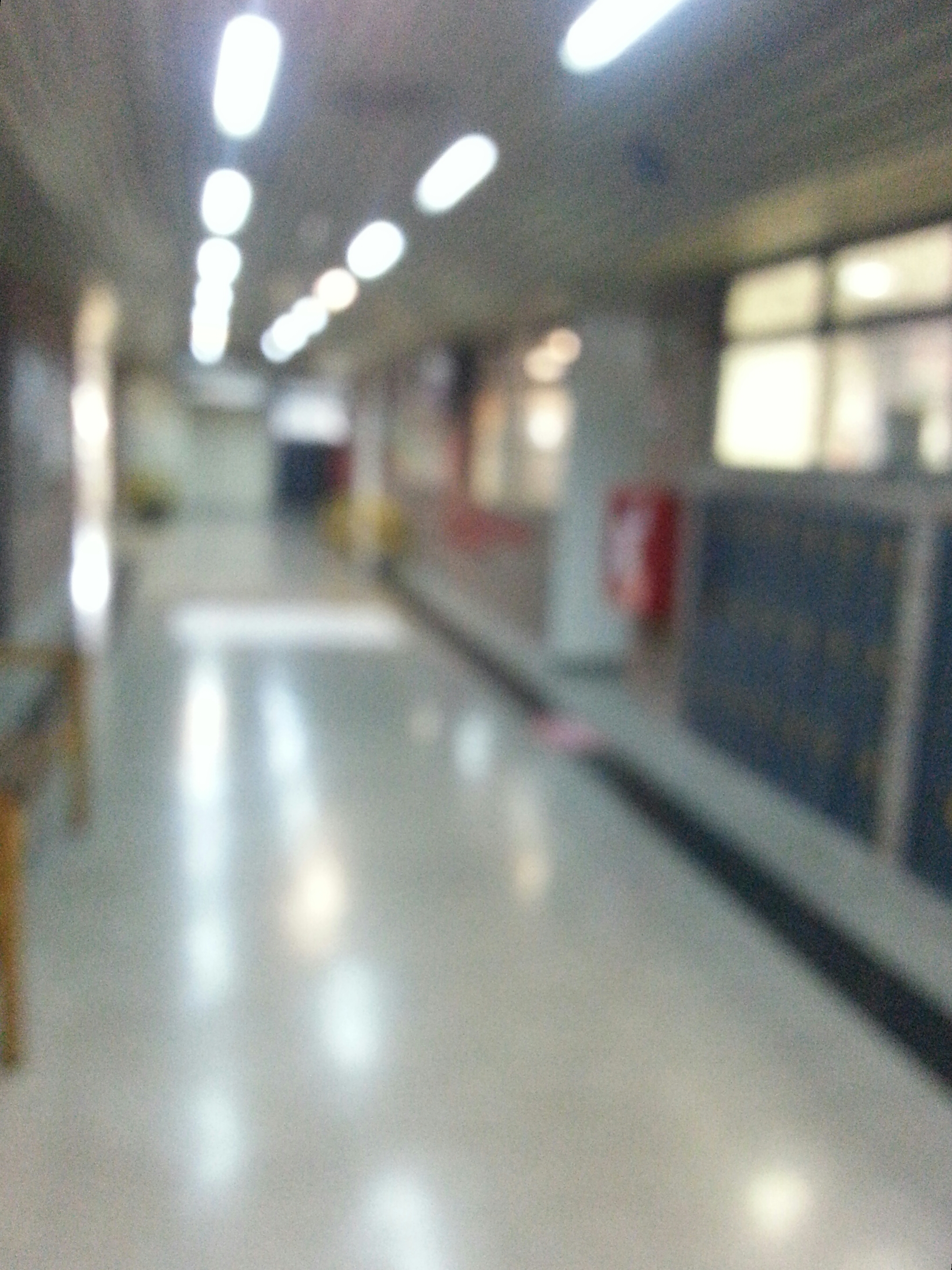 Pasillo Borroso